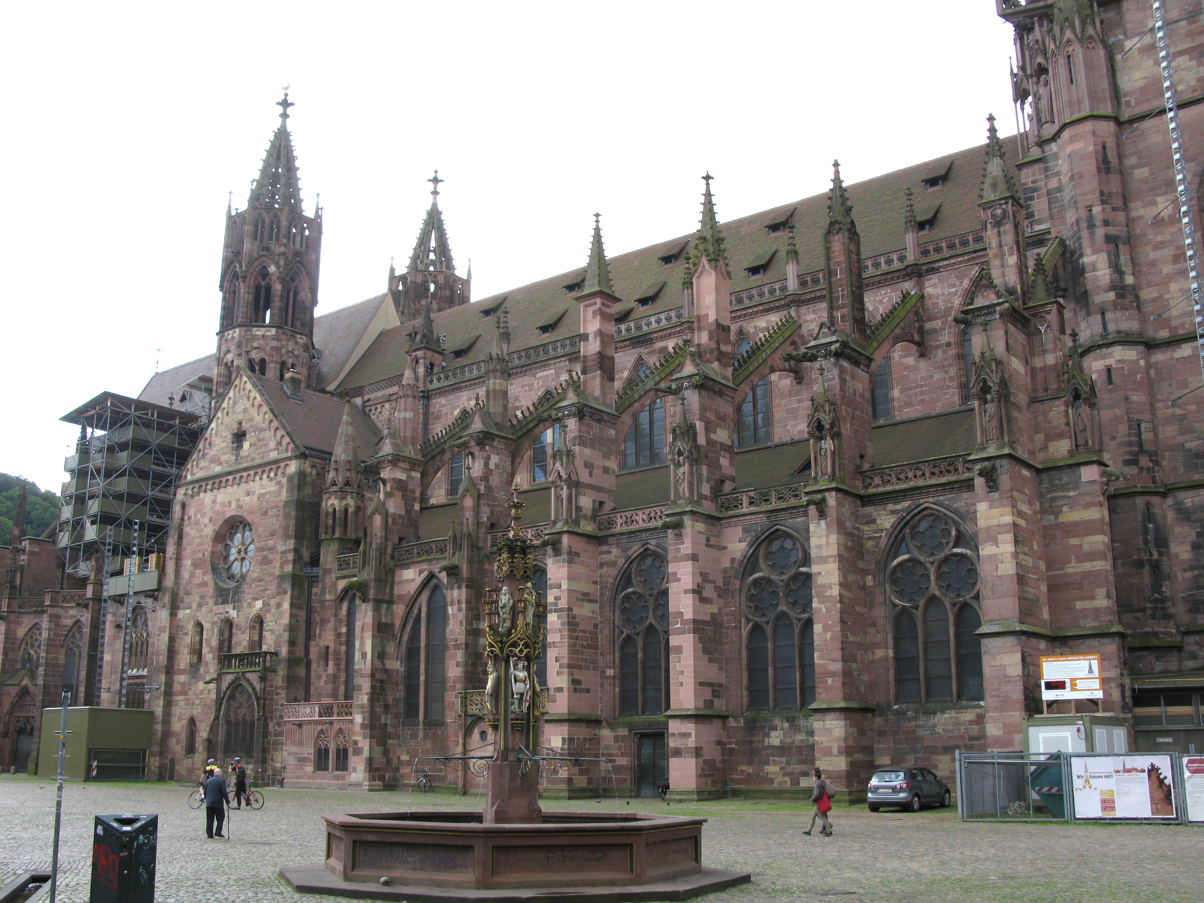 Freiburger Münster Nordseite mit Fischbrunnen